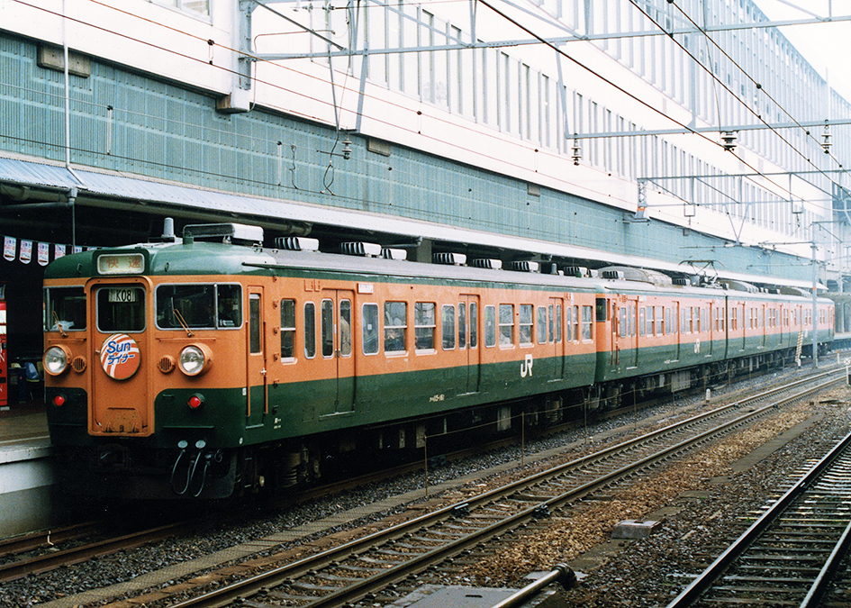 JR西日本 115系電車 快速 Sunライナー 岡山駅にて